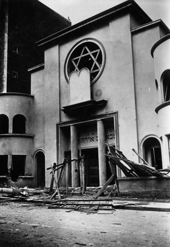 Frankreich, Paris, zerstörte Synagoge ADN-ZB Frankreich in der Periode der deutschen Okkupation und des Vichy-Regimes 1940/44 Eine zerstörte Synagoge im 18. Stadtbezirk von Paris. (Aufn.: 1941) 9401-41